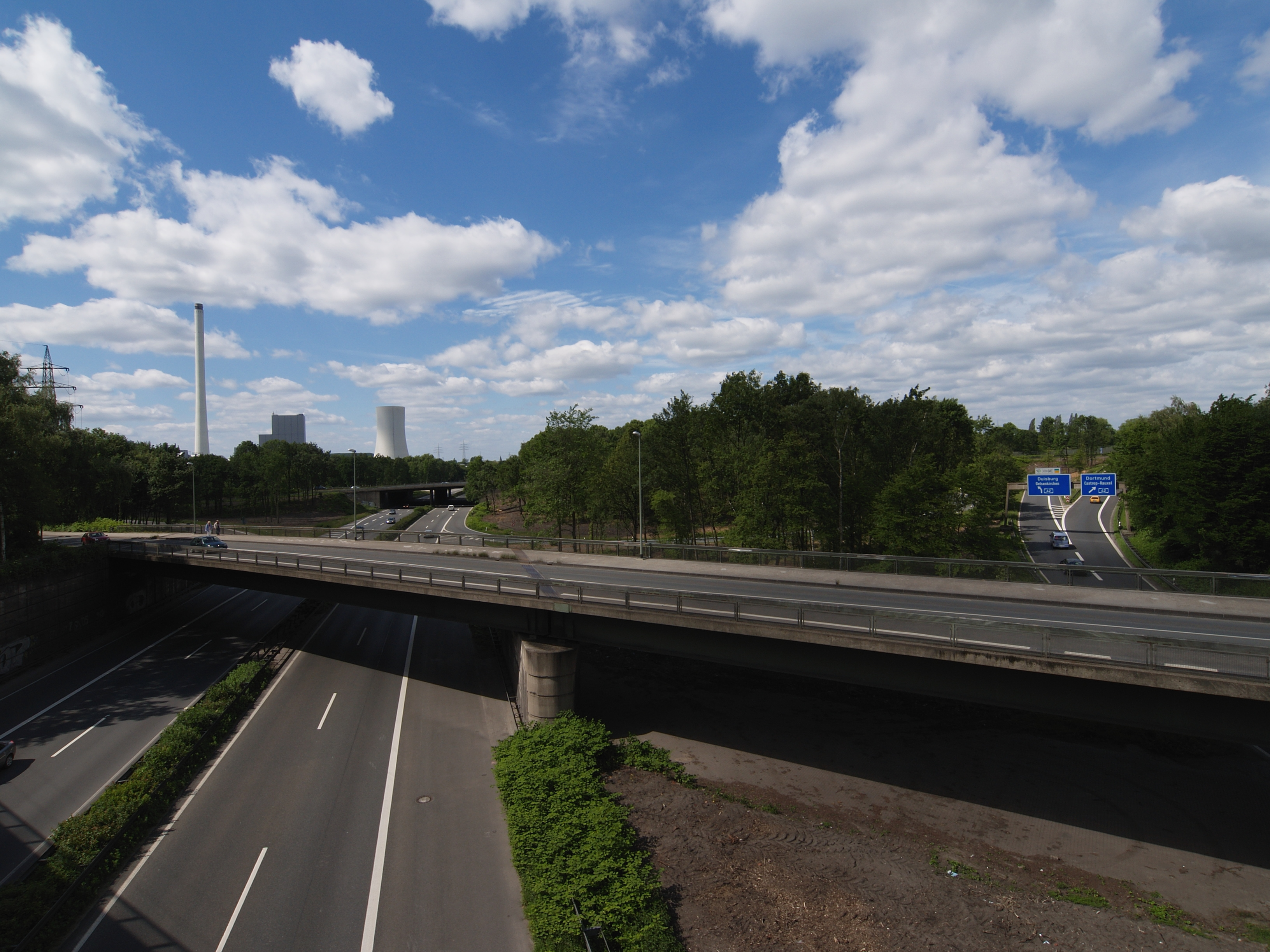 Autobahnkreuz Herne, Blick von Süden über der A43